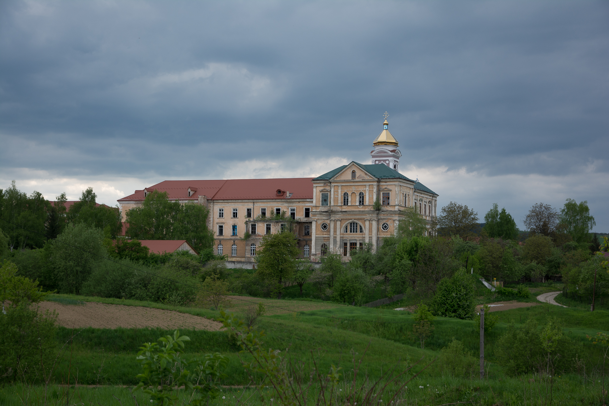 Колегія єзуїтів (му), Хирів, вул. Б. Хмельницького,40